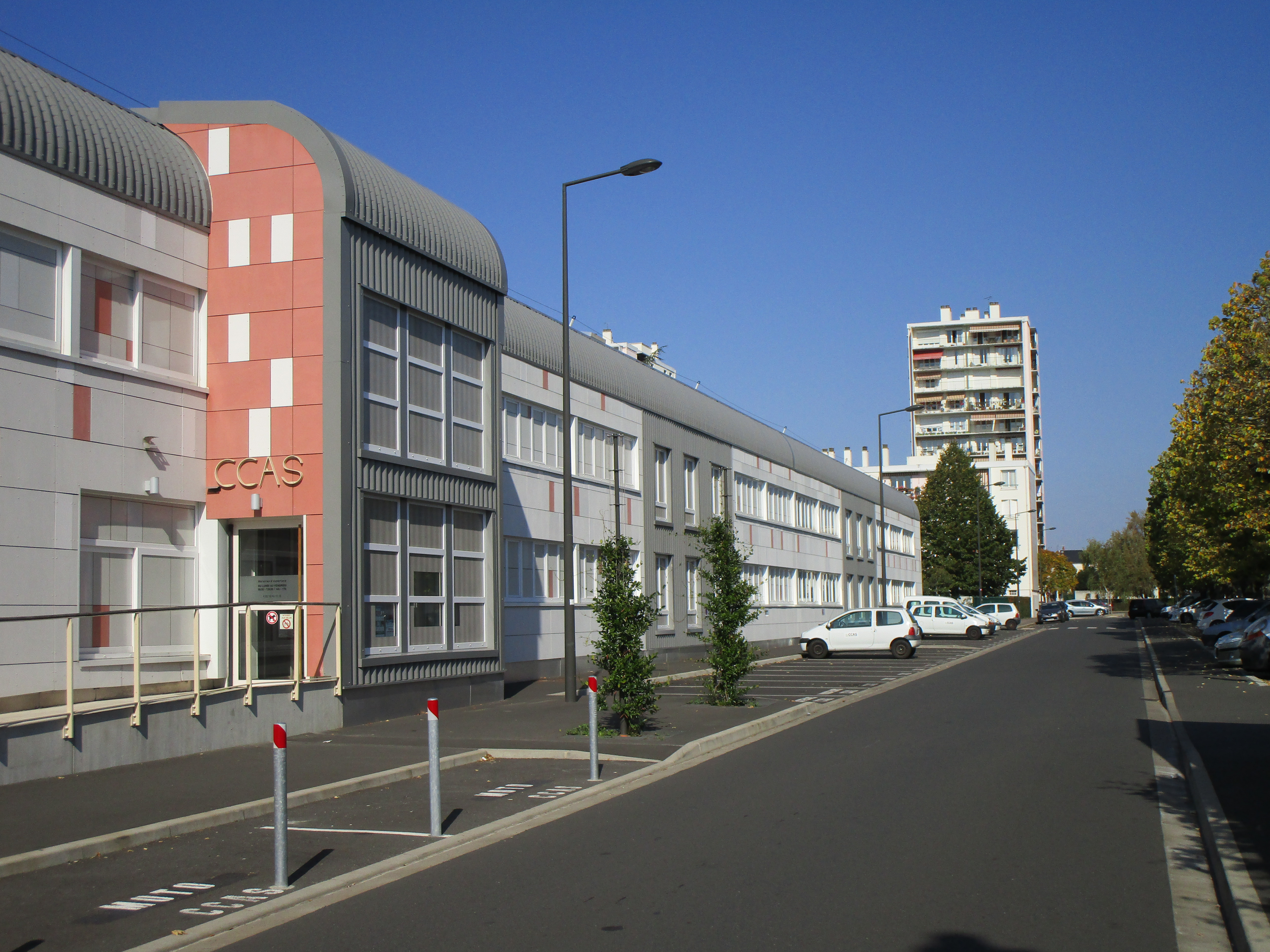 Le centre communal d'action sociale du quartier Febvotte-Marat, 2 allée des Aulnes, à Tours.